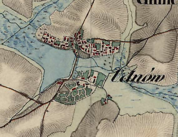 XIX